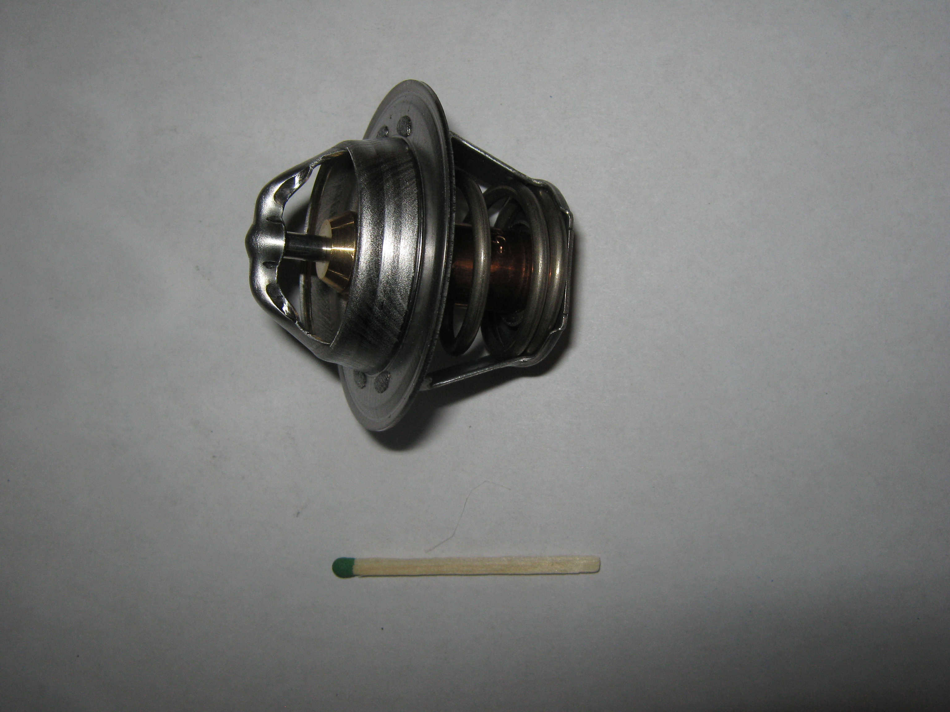 Termostat samochodu osobowego. Termostat stosowany w samochodzie Daewoo Lanos z silnikiem 1.5 16V